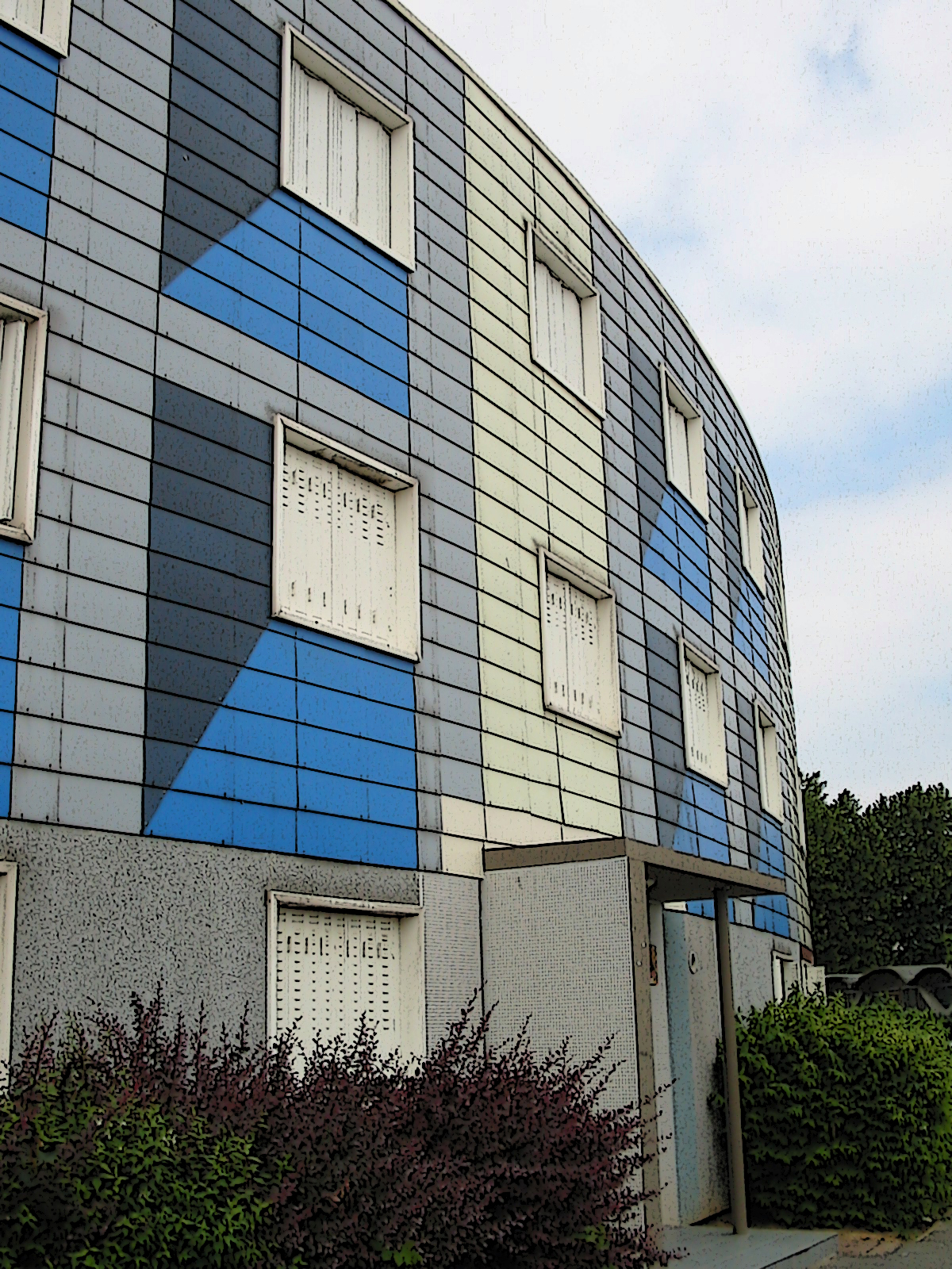 Façade d'un immeuble aux Petits pas, la Grande Borne, Grigny, Essonne, France